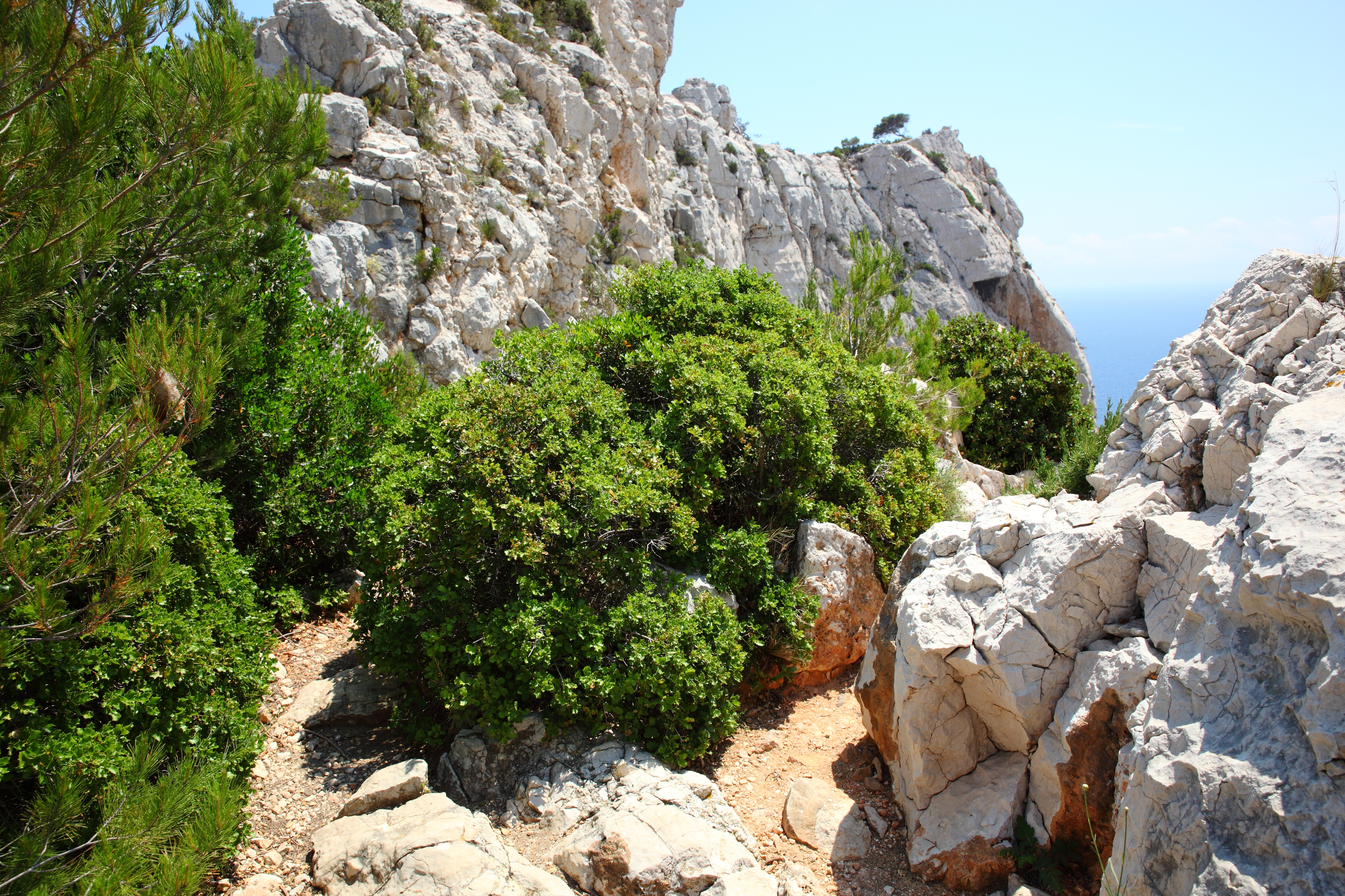 Stech-Eiche Quercus coccifera in den Calanques, typischer Habitus.